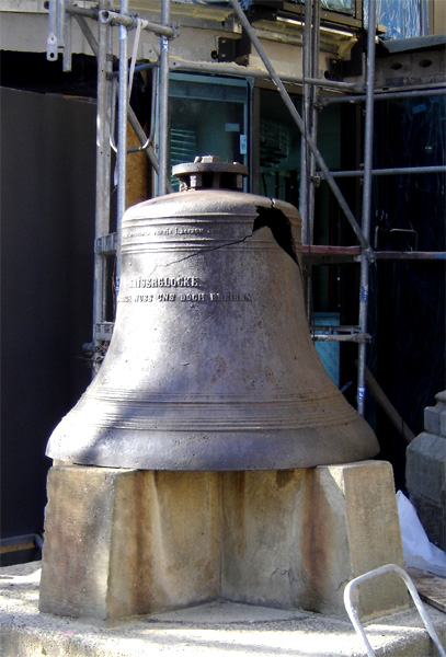 Dëst Bild weist d'Kaiserglocke virun der Dortmunder Reinoldikierch.